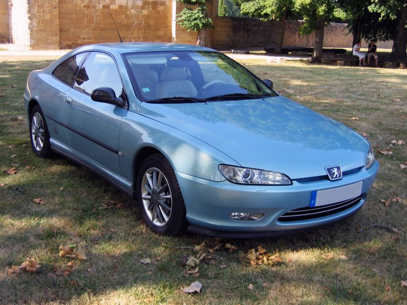 Peugeot 406 Coupé Settant'anni bleu Hypérion et ses jantes Nautilus